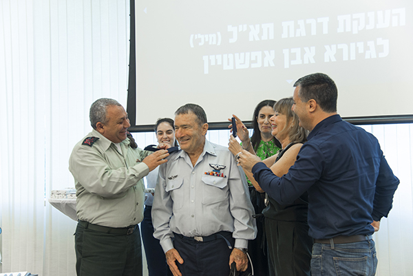 טקס הענקת דרגת תא"ל לטייס העבר ואלוף העולם בהפלות סילוניות, גיורא אבן-אפשטיין. בתמונה: הרמטכ"ל רא"ל גדי איזנקוט ובני משפחה עונדים לאפשטיין את דרגות תת האלוף על מדיו.